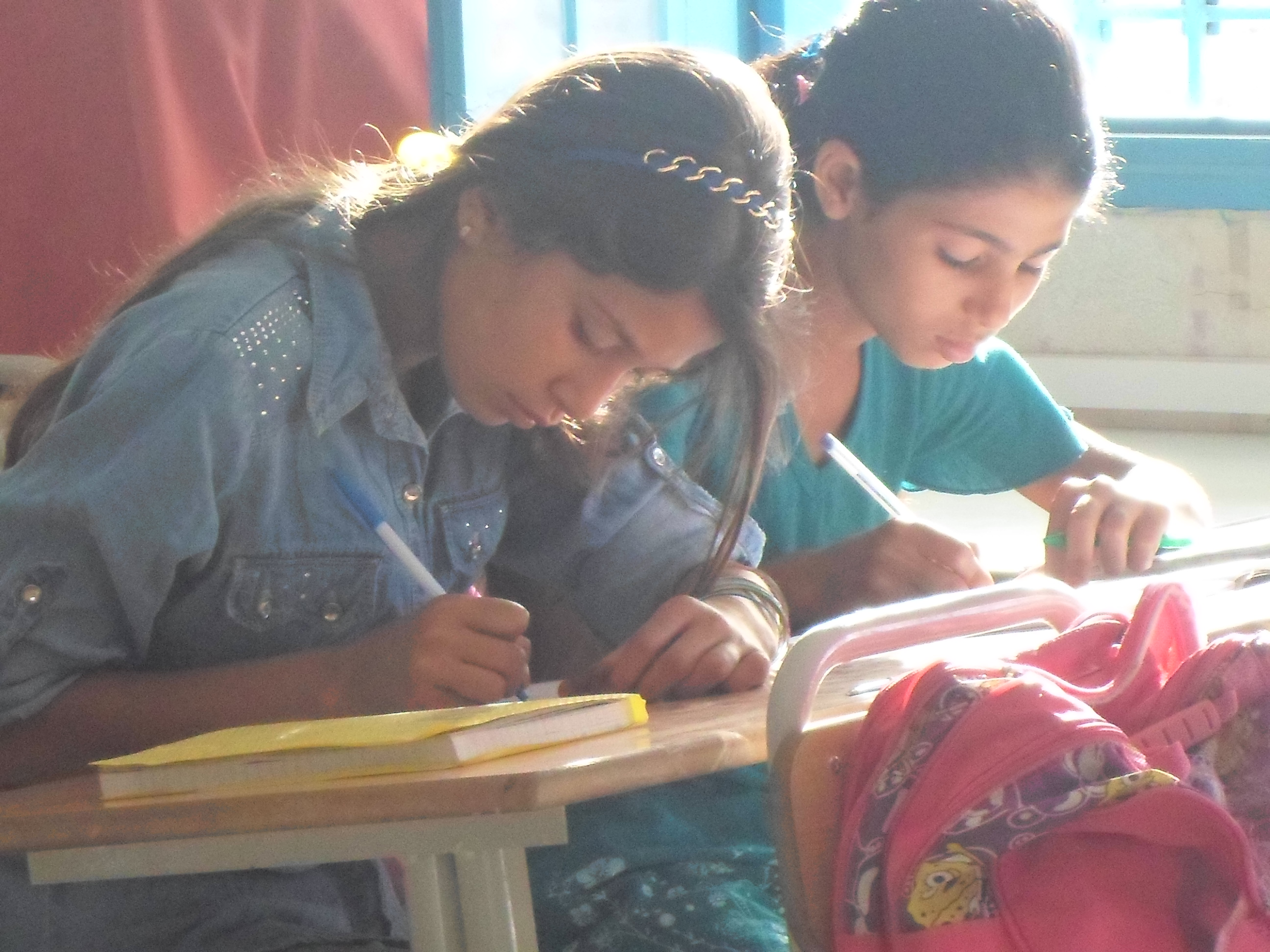 صورة من مدرسة جلمة سيدي بوزيد